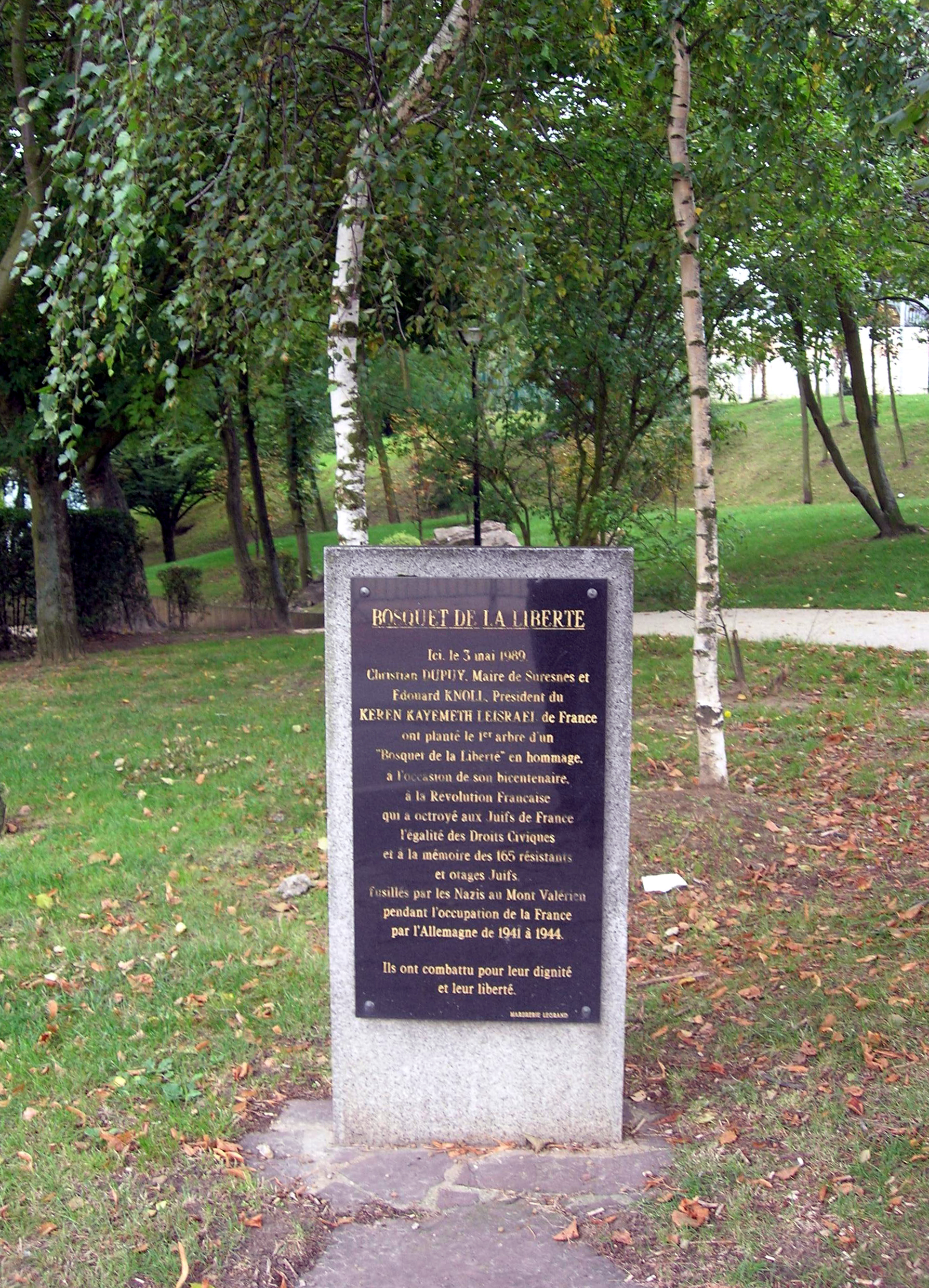 Description =Bosquet de la Liberté à Suresnes Texte écrit sur la plaque : BOSQUET DE LA LIBERTE Ici, le 3 mai 1989, Christian DUPUY, Maire de Suresnes et Edouard KNOLI, Président du KEREN KAYEMETH LEISRAEL de France ont planté le 1er arbre d'un "Bosquet de la Liberté" en hommage, à l'occasion de son bicentenaire, à la Révolution Française qui a octroyé aux Juifs de France l'égalité des Droits Civiques et à la mémoire des 165 résistants et otages Juifs fusillés par les Nazis au Mont Valérien pendant l'occupation de la France par l'Allemagne de 1941 à A944. Source =Photo taken by Remi Jouan Date =Septembre 2006 Author =Remi Jouan